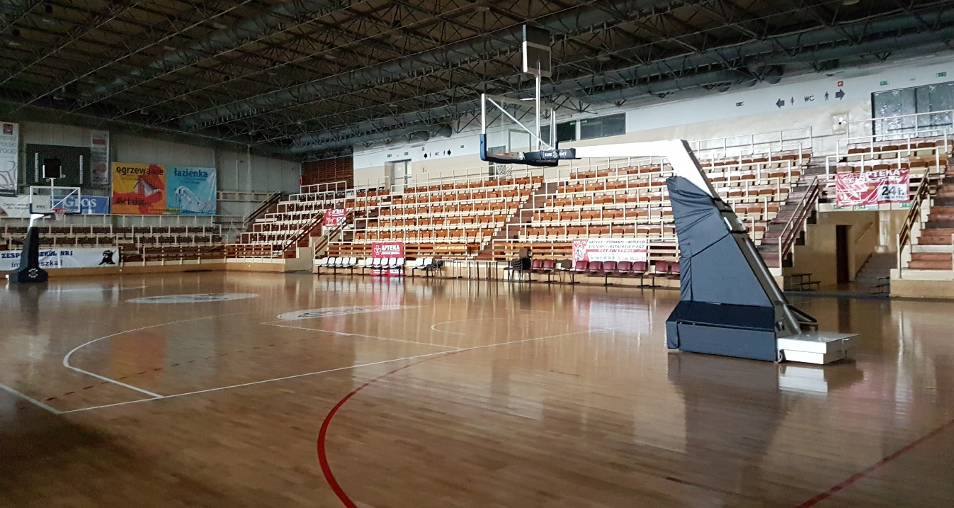 Stargard, 05.05.2017r. Hala sportowa OSiR, widok na starą trybunę